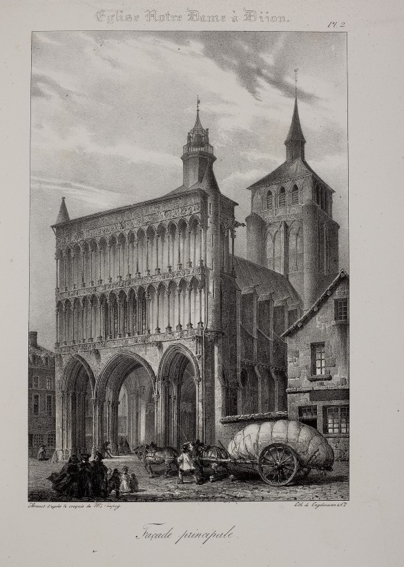 Dijon, Notre-Dame (Westfassade)